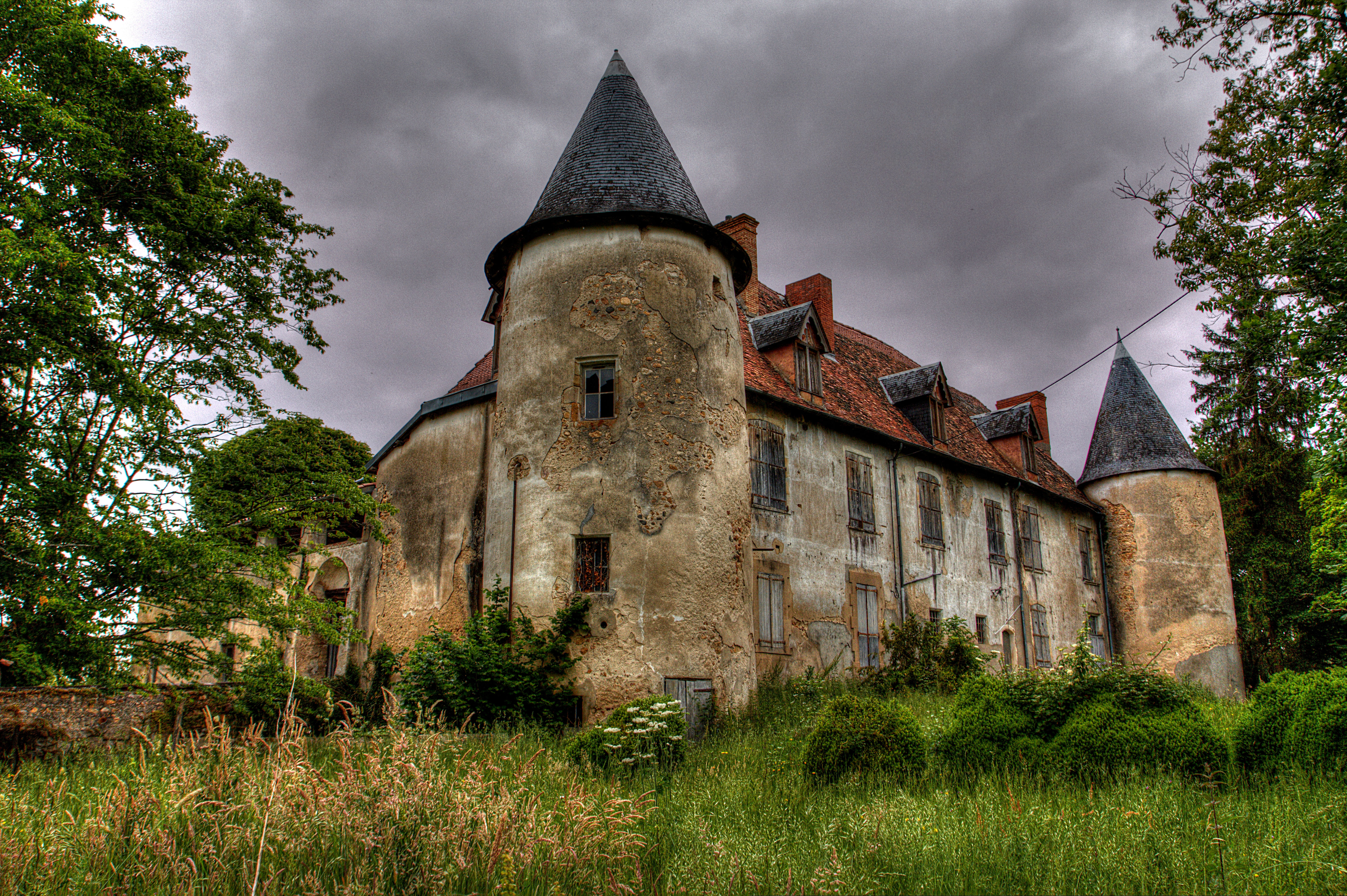 Château de la Bâtisse, XVIème siècle, Puy Guillaume